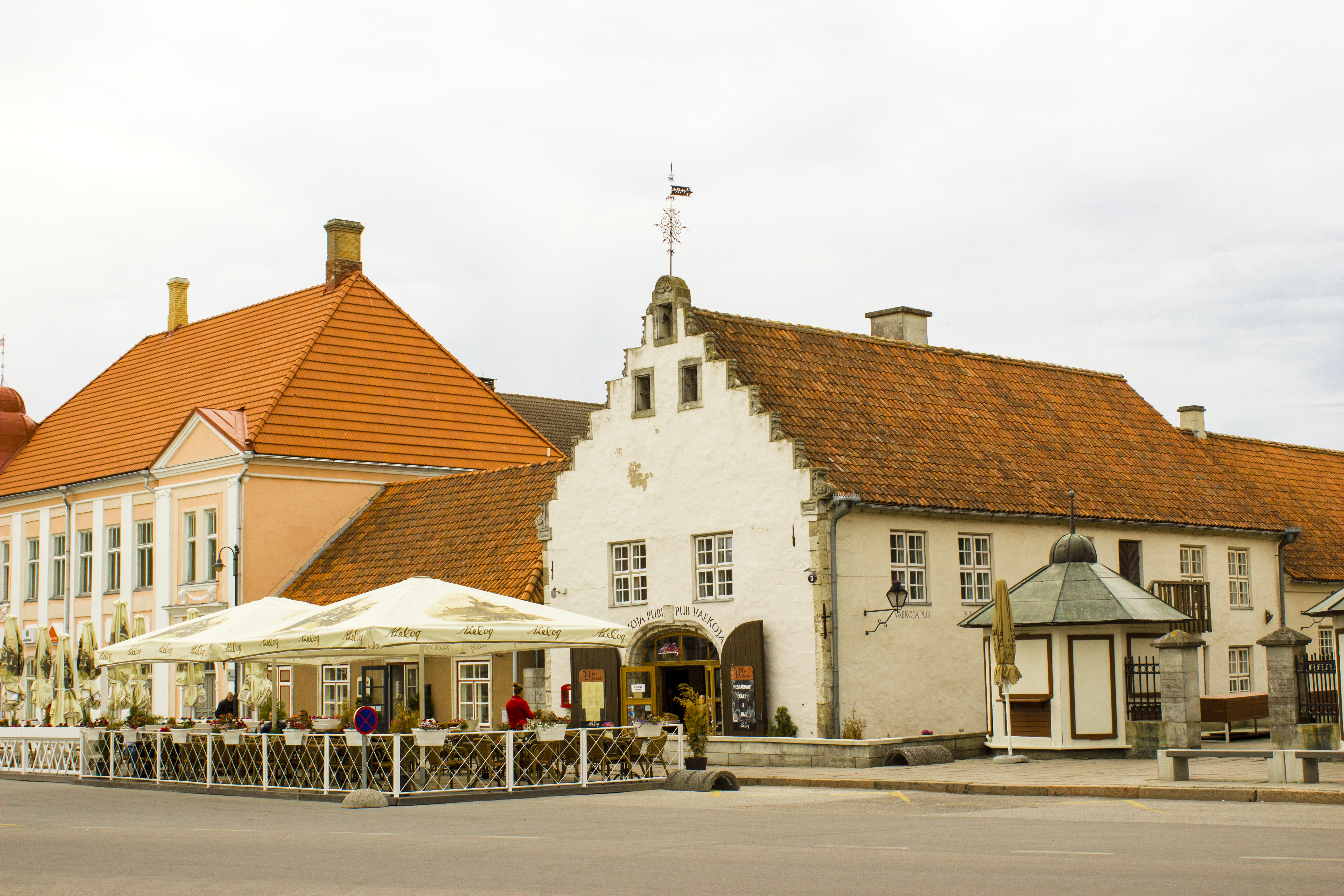 Kuressaare